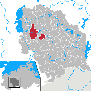 Crivitz in Mecklenburg-Vorpommern - District Parchim